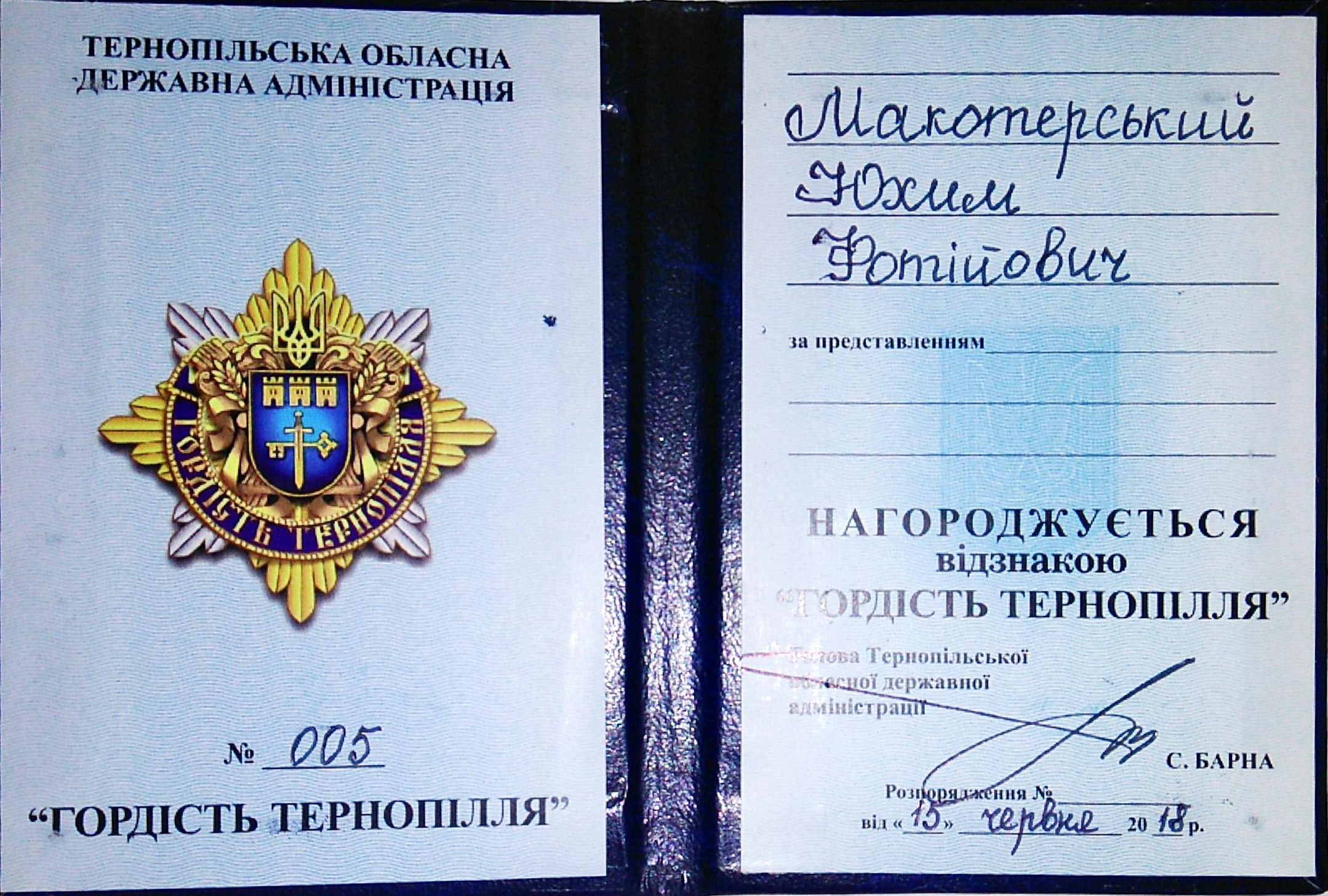 Посвідчення Юхима Макотерського № 5 нагородженого Відзнакою Тернопільської облдерж адміністрації.